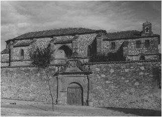 Fotografía del convento de las Bernardas anterior a la construcción del colegio San José de Calasanz